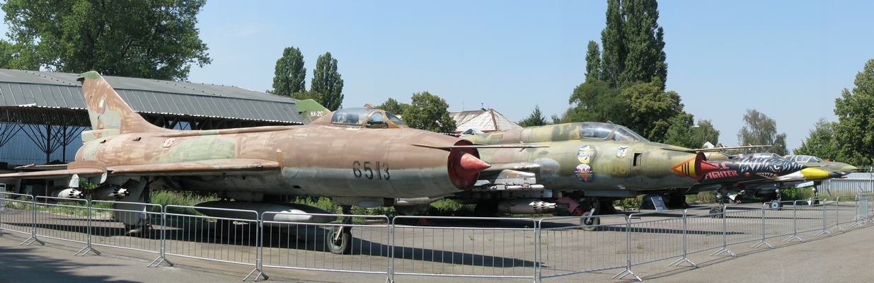 Praha-Kbely Airmuseum: Su-7BKL, Su-22(M-4?), MiG-23, MiG-23BN, MiG-23UB